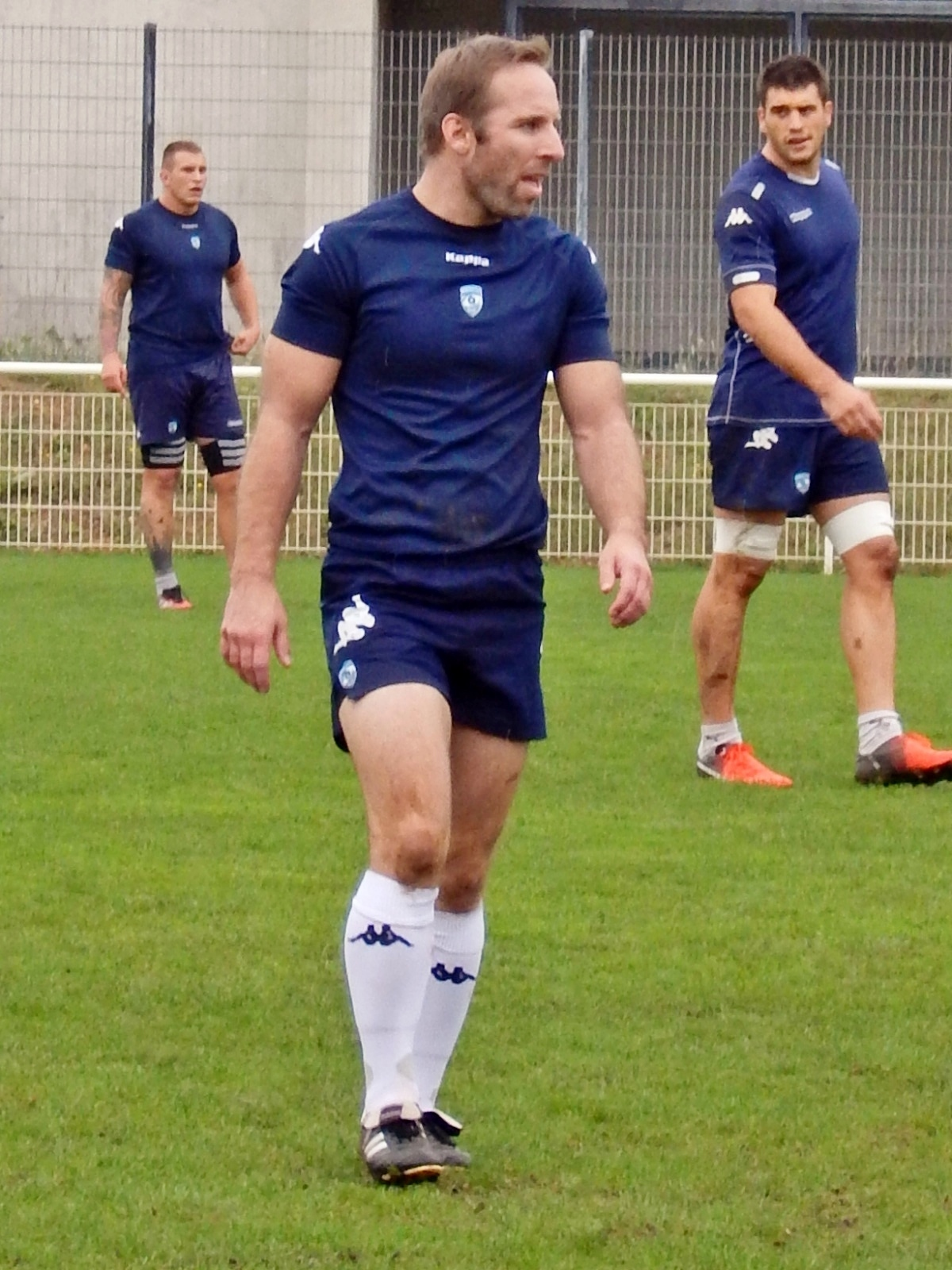 Tomas O'Leary (Montpellier), octobre 2016